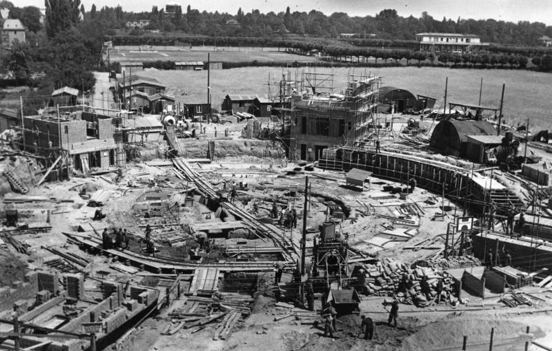 Frankfurt/Main, Bau Kongresshalle Steuerzahler schaut zu Der Streit um den Sitz der Bundeshauptstadt scheint nach den Bauvorhaben der beiden Städte Bonn und Frankfurt zu urteilen noch nicht entschieden zu sein, denn auch Frankfurt rüstet mit aller Macht, um später - wenn die Entscheidung schliesslich doch einmal auf die Mainmetropole fallen sollte - über die entsprechenden Unterkünfte als künftige Bundeshauptstadt verfügen zu können. Unser Bild zeigt den Neubau einer Kongresshalle, die mit einem Kostenaufwand von einer Million DM, an die als Kanzlei der Bundesregierung vorgesehene Pädagogische Akademie in Frankfurt/Main angebaut wird. 12-7-49 Illus-dpd